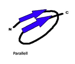 Parallell Beta-pleated sheet Inte särskilt vacker, men borde föra över budskapet. Skapad av: Användare:Vili Skapad: 2004-11-17